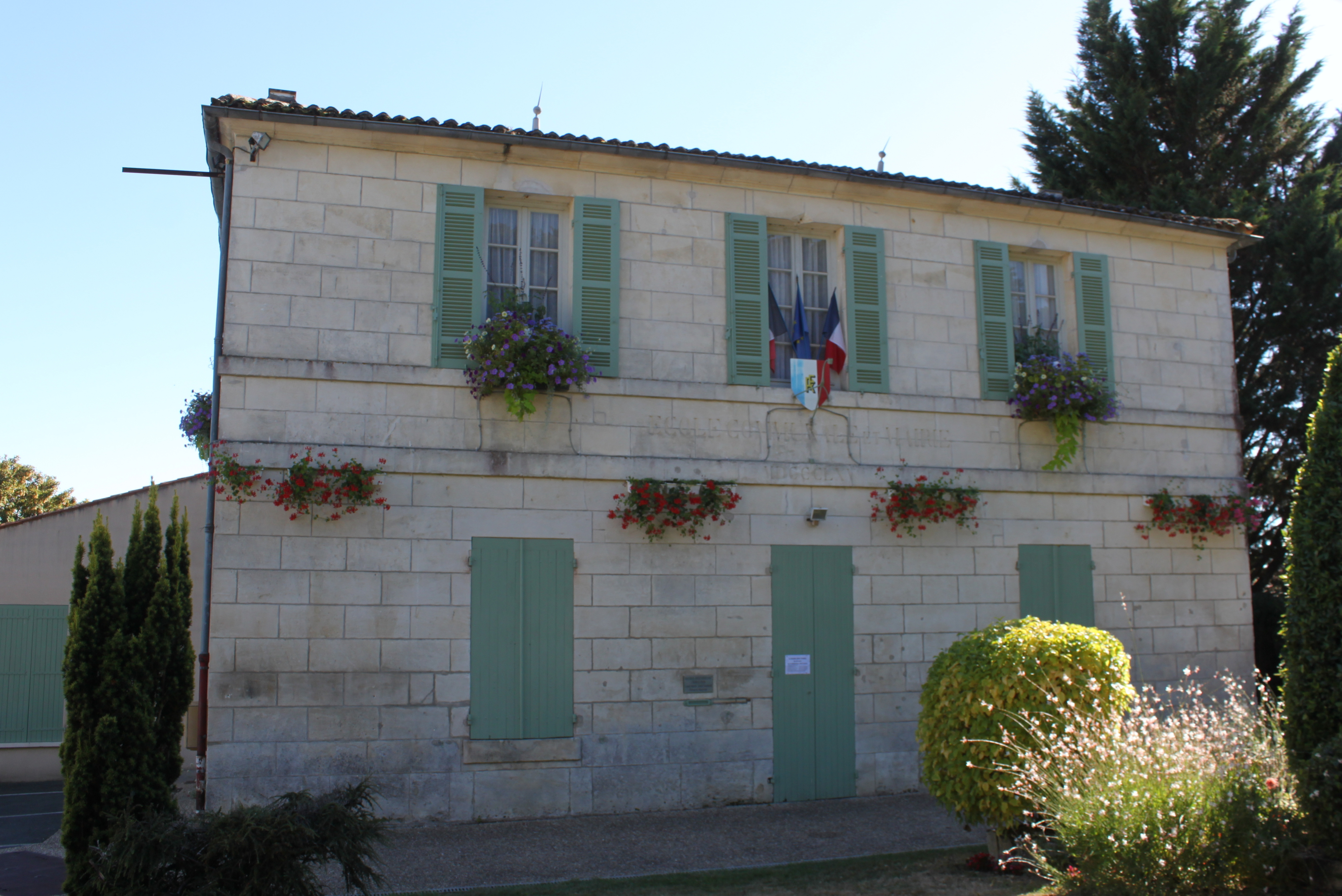 Mairie, Fr-17-Vénérand.